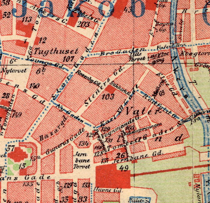 Vaterland, Oslo.